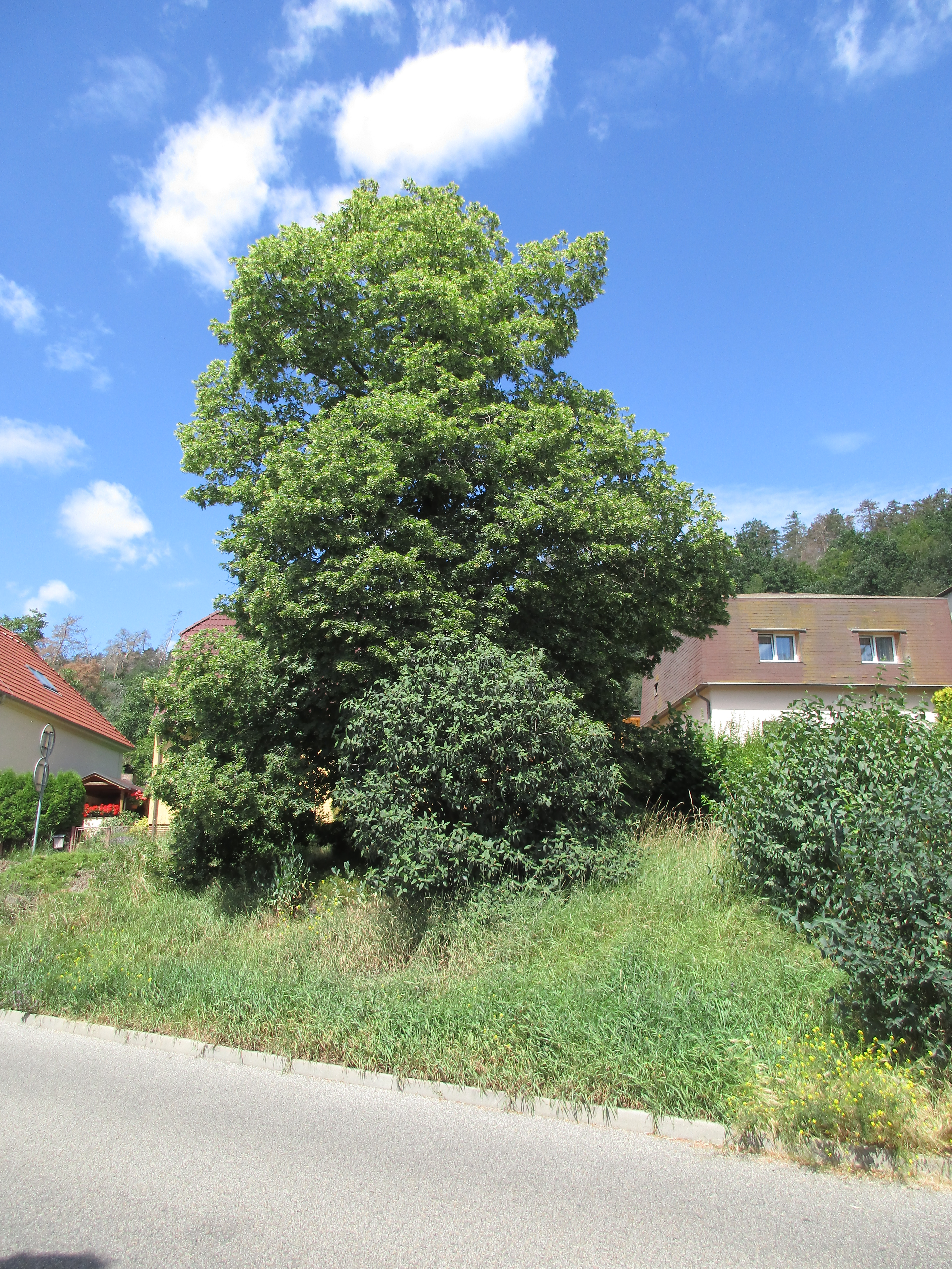 Lípa republiky. Praha 5 - Radotín, křižovatka ulic Pod Lahovskou a Strážovská. Vysazena 28. října 1968.